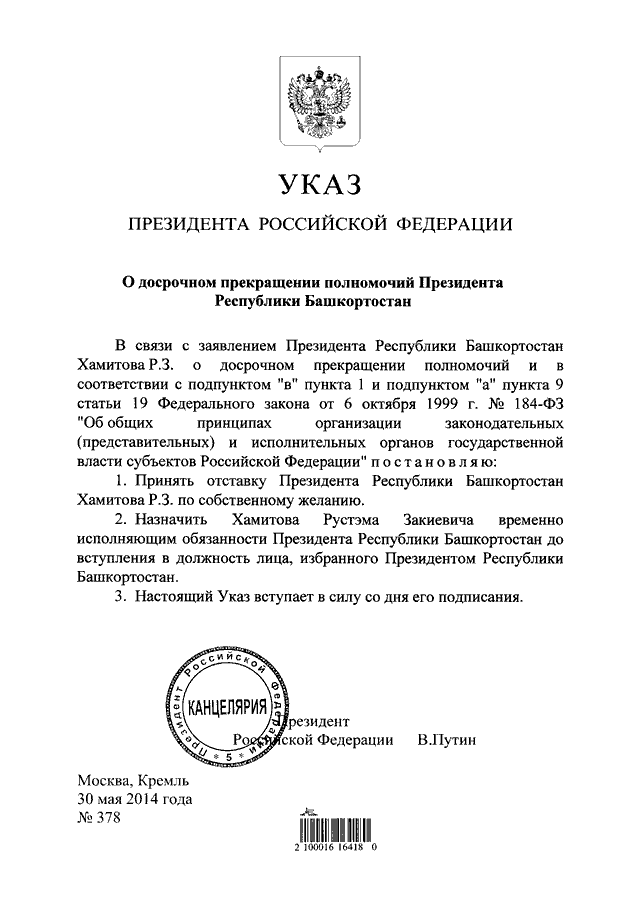 Указ Президента РФ от 30.05.2014 N 378 "О досрочном прекращении полномочий Президента Республики Башкортостан"